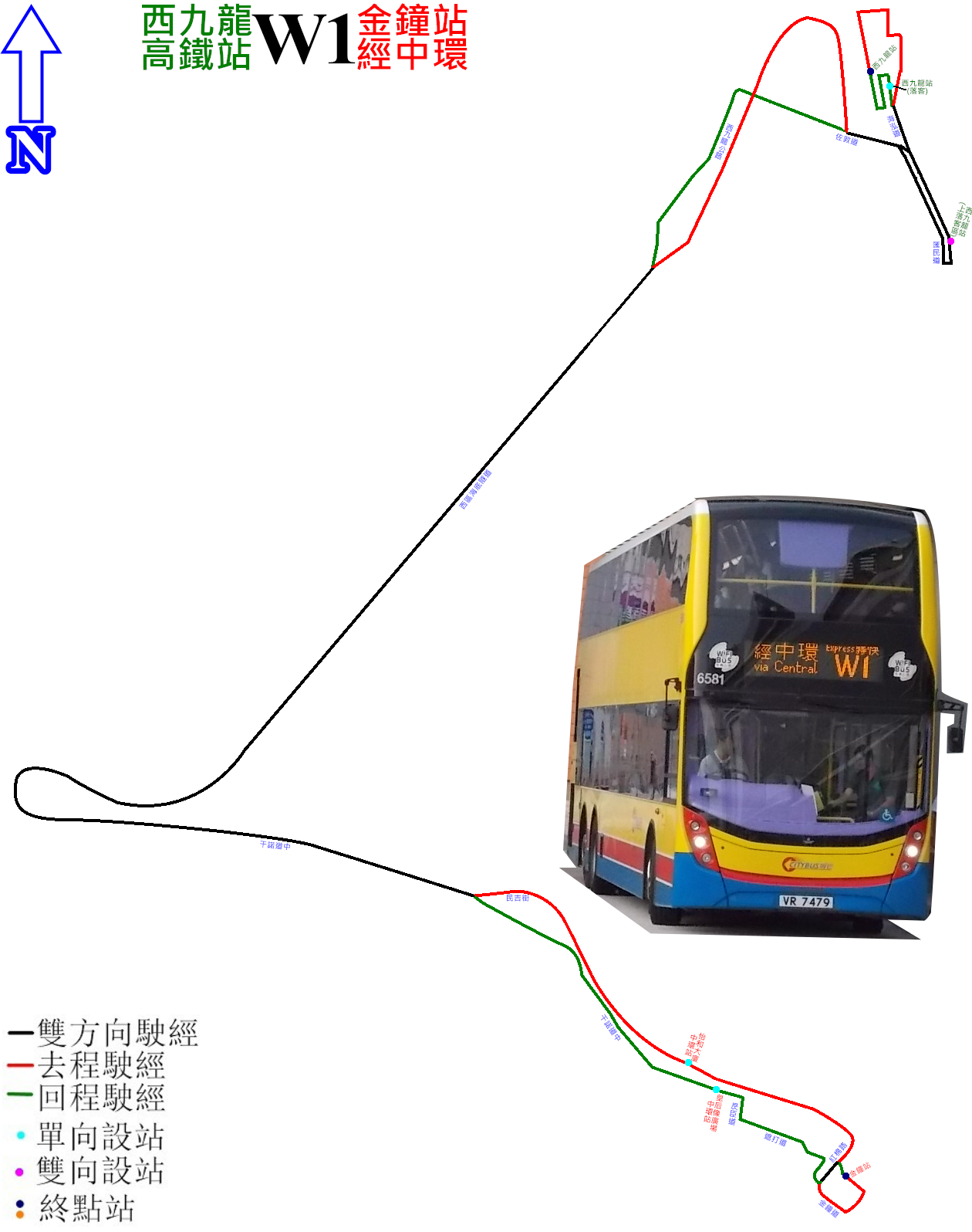 城巴W1線的走線圖